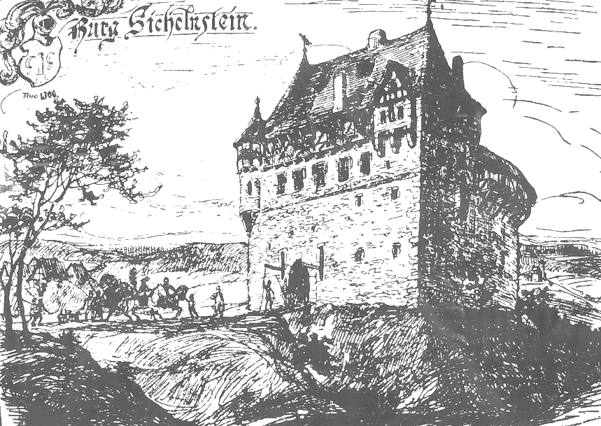 Burg Sichelnstein (in Staufenberg, Ortsteil Sichelnstein, Niedersachsen, Germany) vor der Erweiterung von 1372